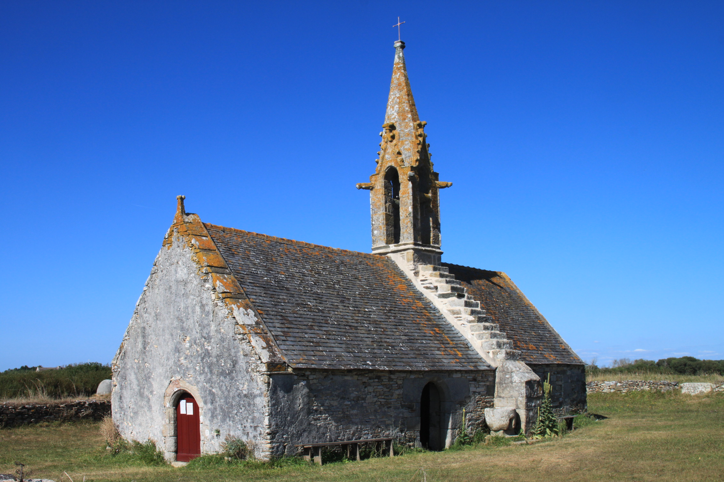 La plus petite des chapelles bigoudènes. 50 m2 à peine, sur la palue de Tréguennec, avec son petit escalier extérieur. Filmée dans le film « Le crabe tambour »